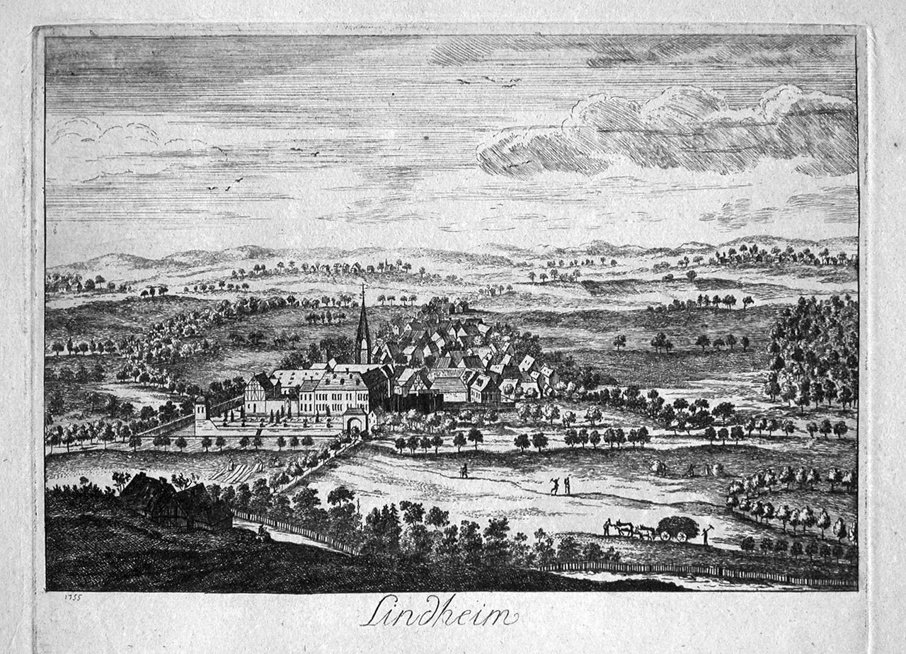 Ansicht von Lindheim eines unbekannten Künstlers, datiert unten links (1755), Kupferstich auf Papier, Original in der Grafischen Sammlung des HLMDA.